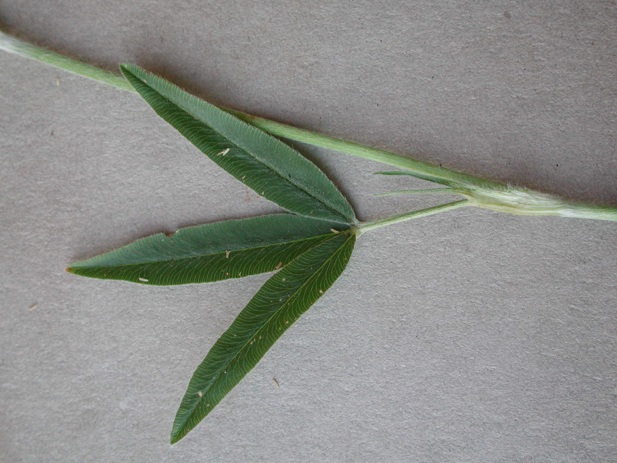 particolare della pagina superiore di una foglia di Trifolium alpestre